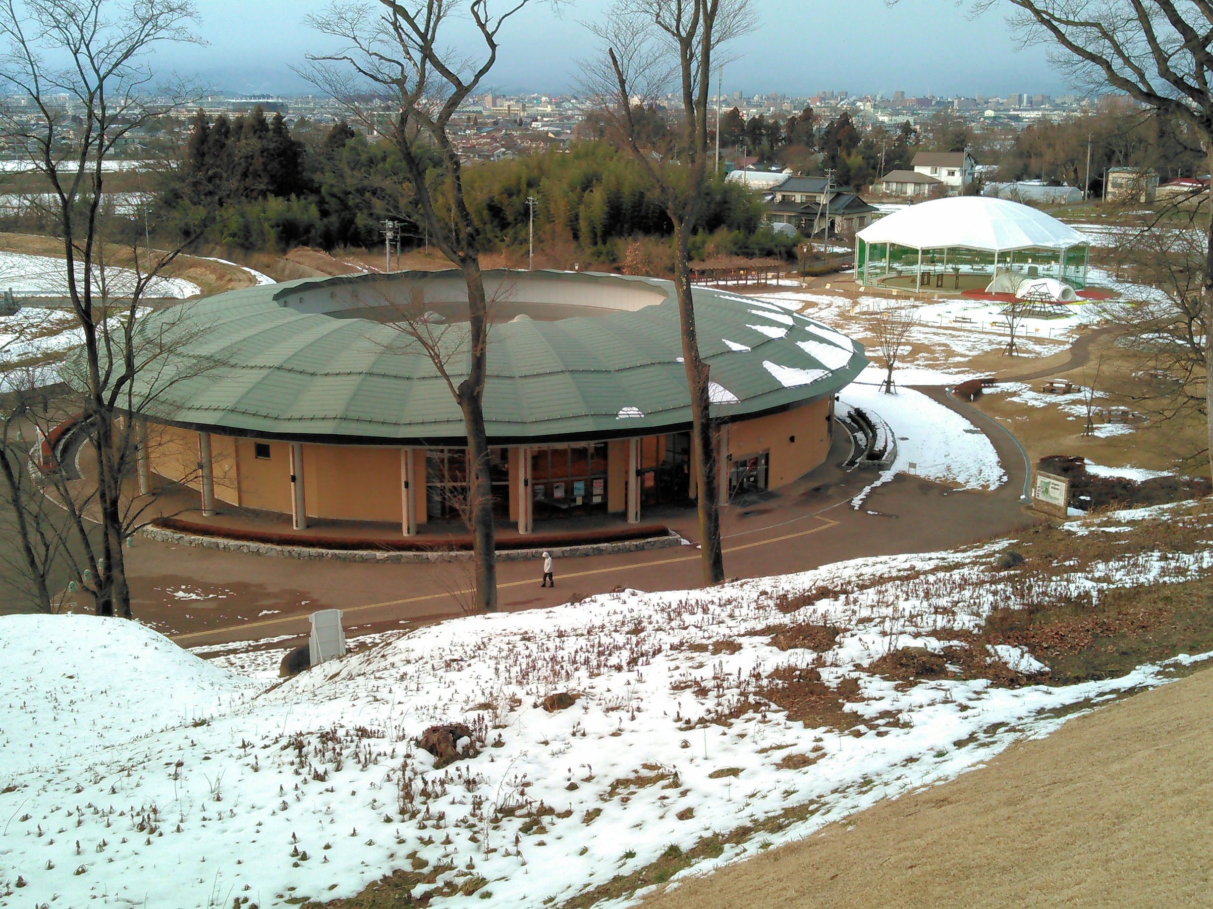 大安場史跡公園 ガイダンス施設付近を1号墳上から